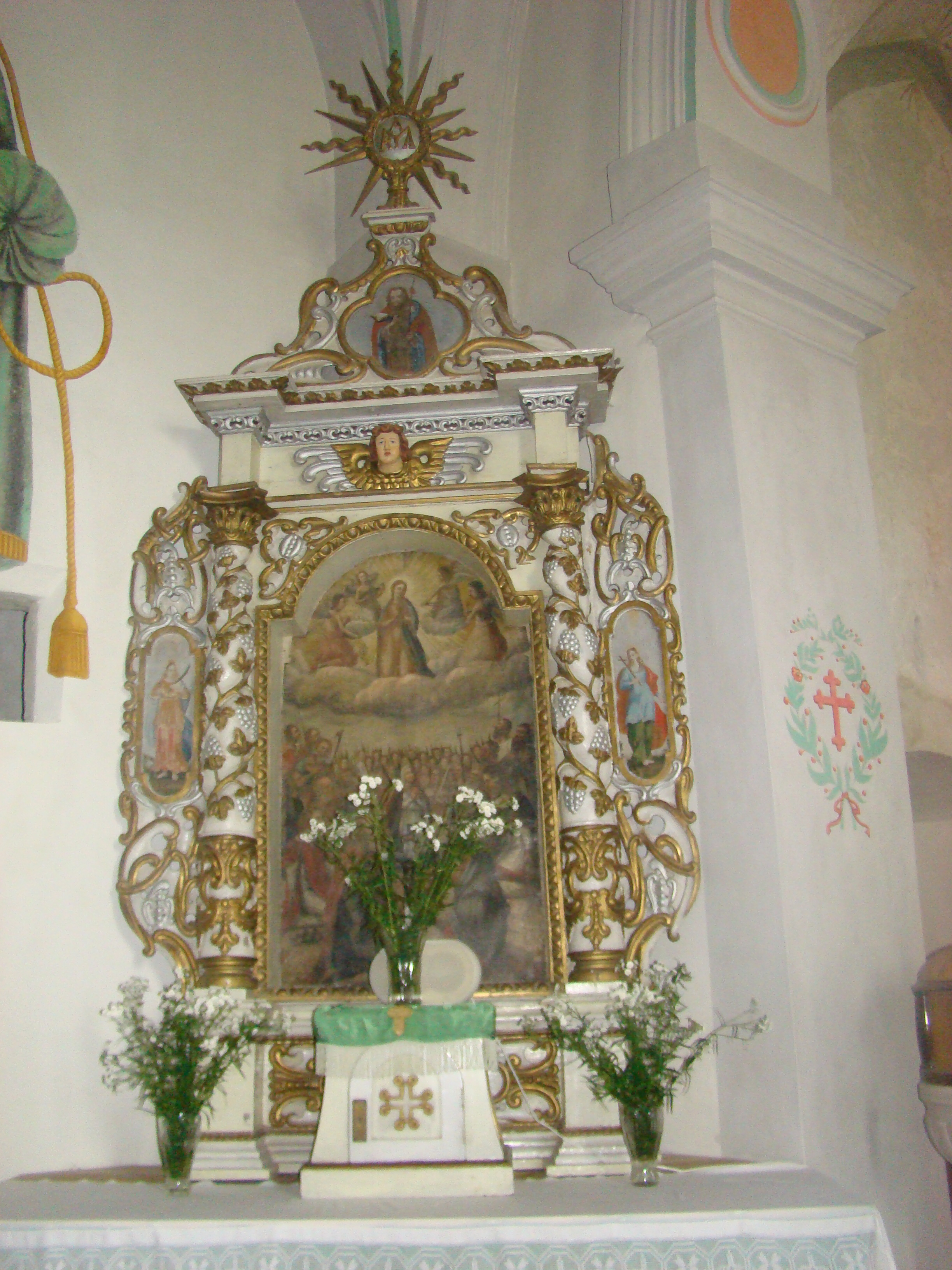 Lăzarea, județul Harghita